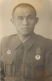 М.Нурбаев Депутат Верховного Совета СССР 1944г.